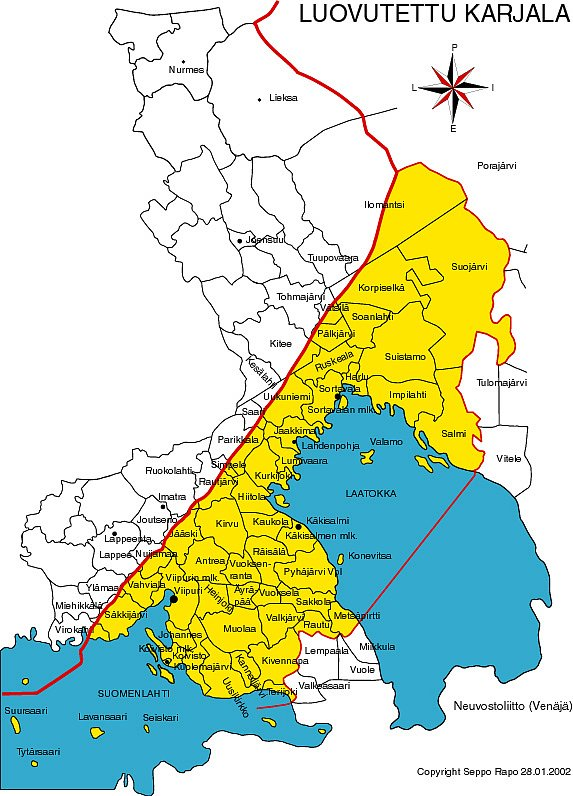 В каждой общине располагается лютеранский приход.